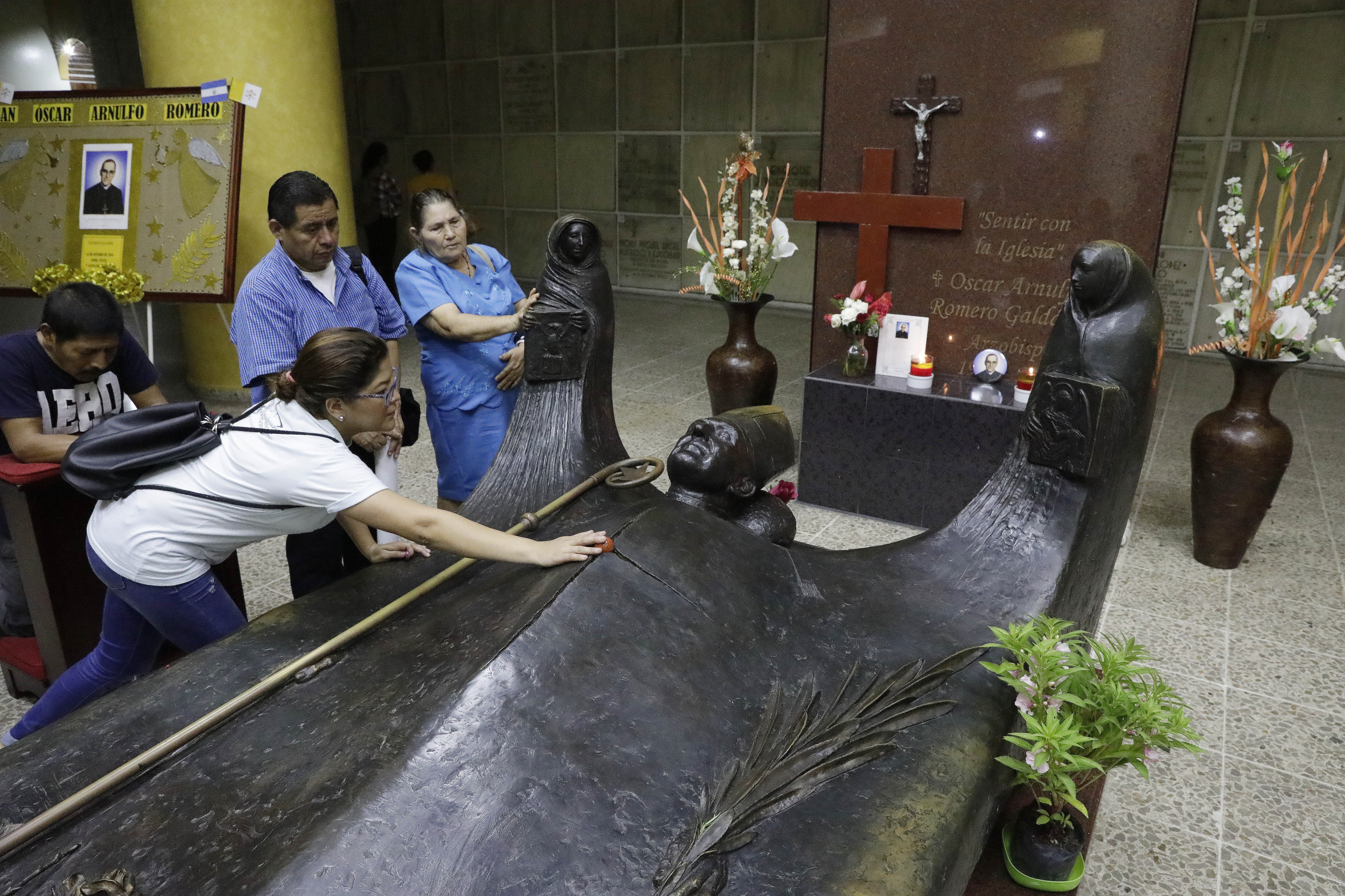 Canonización Monseñor Romero--San Salvador.